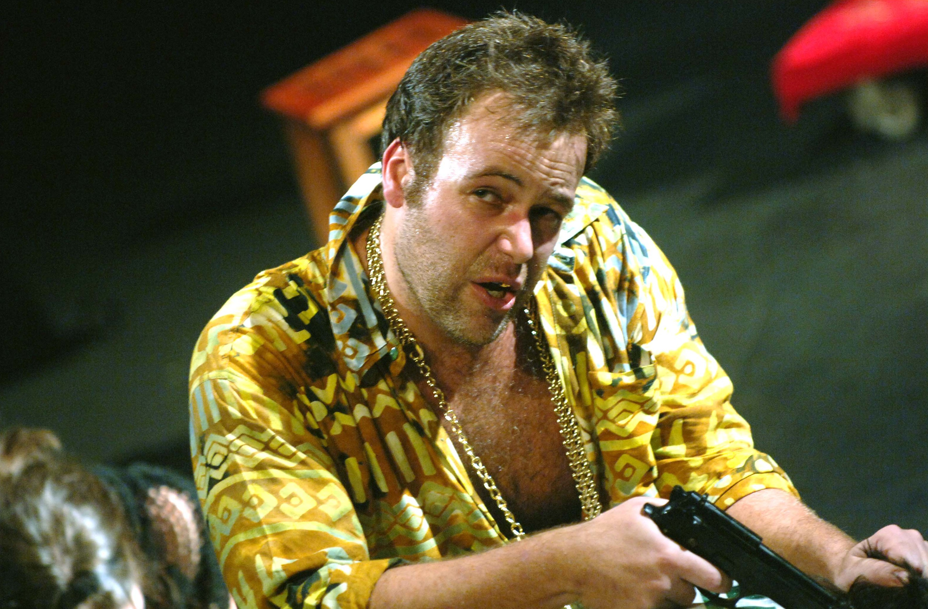 Representación en Brasil de la obra «Boca de ouro»